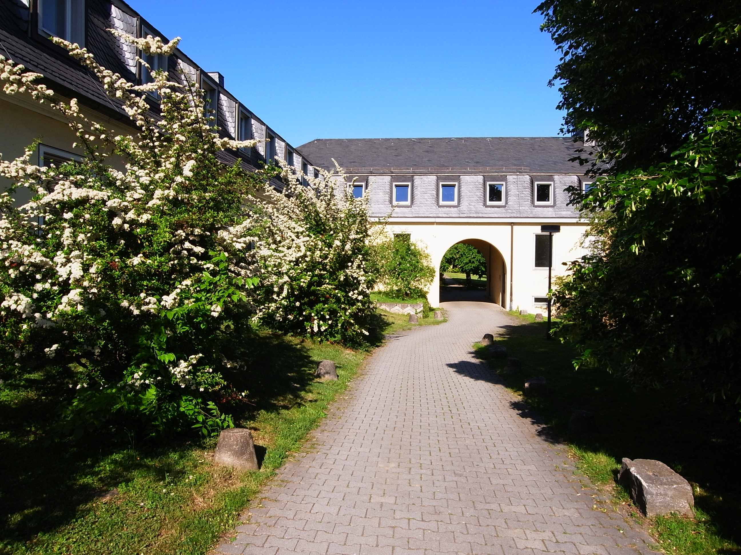 Ausschnitt aus dem Campus der Universität Hohenheim